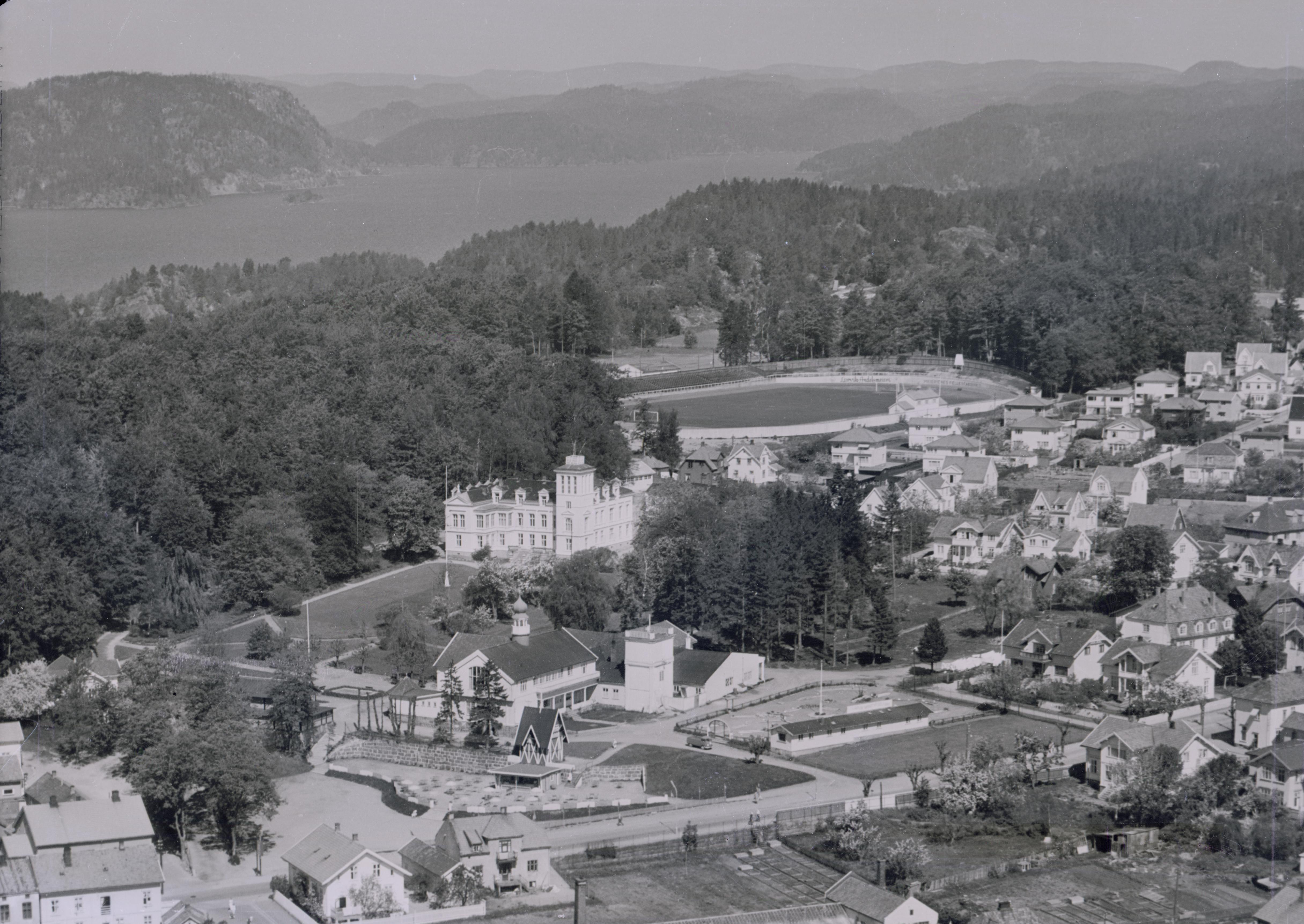 WF.HL.Uten_nummer001 "Friluften"